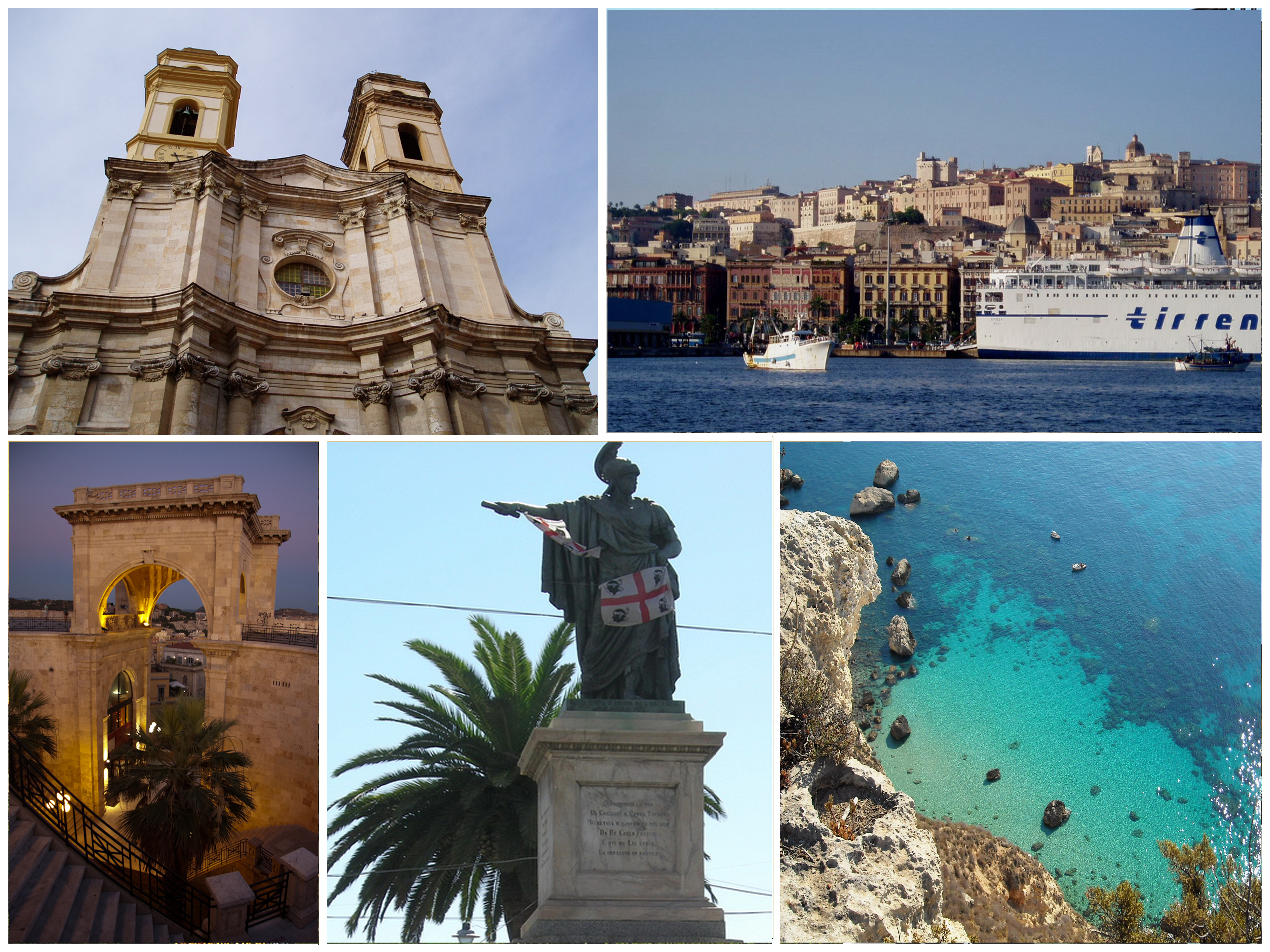 Collage di foto varie della città di Cagliari . Sopra da sinistra a destra : Facciata della chiesa barocca di Sant'Anna - Visuale di Via Roma dal mare . Sotto da sinistra a destra : Bastione di Saint Remy - Statua di Carlo Felice , Re di Sardegna in piazza Yenne - Acque cristalline sotto il promontorio della Sella del Diavolo